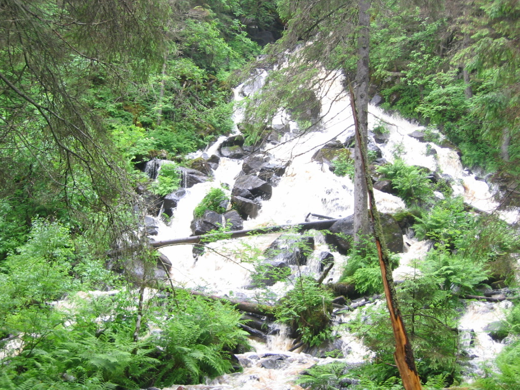 Korkeakoski Kuopion Maaningalla.